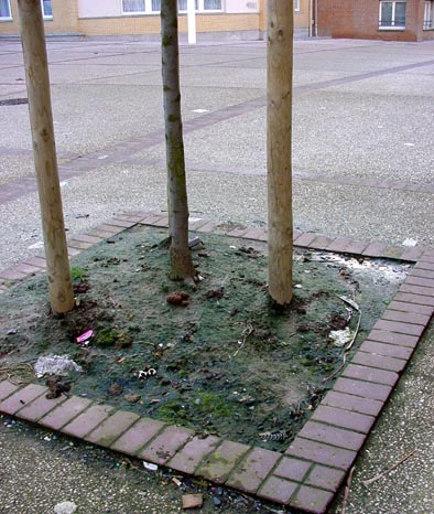 les excréments sont théoriquement une source d'engrais, mais sur sols désherbé, asphyxiants et tassés comme celui ci, ils sont source d'accumulation de microbe et de production de nitrates susceptibles de favoriser le développement de pathogènes (Pseudomonas synringae par exemple) et de polluer l'eau. Renaturer les "pieds d'arbres" permettraient finalement un environnement plus propre que celui qui et débarassé de plantes improprement qualifiées de «mauvaises herbes»